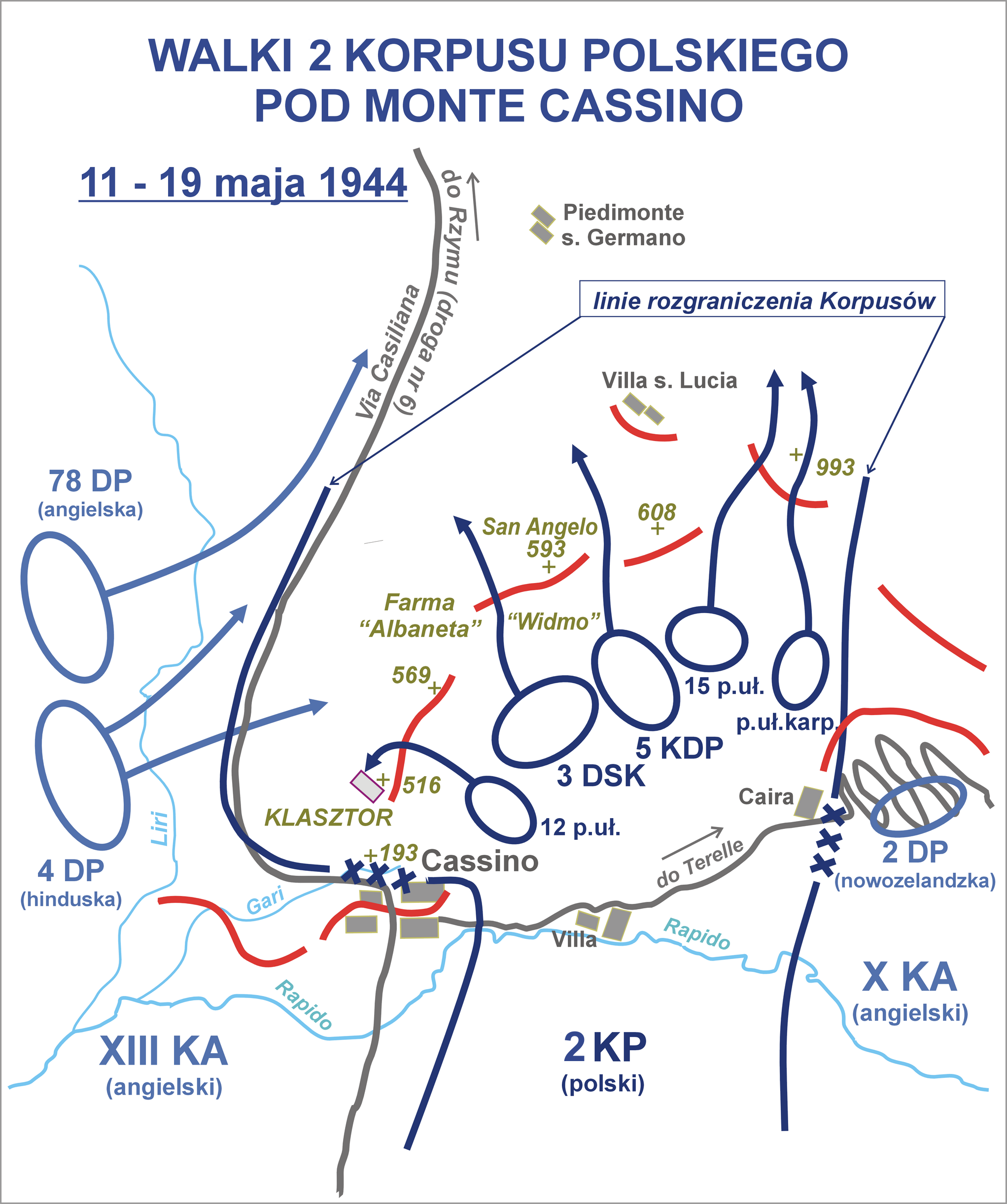 Walki II Korpusu Polskiego pod Monte Cassino (11-19.05.1944)